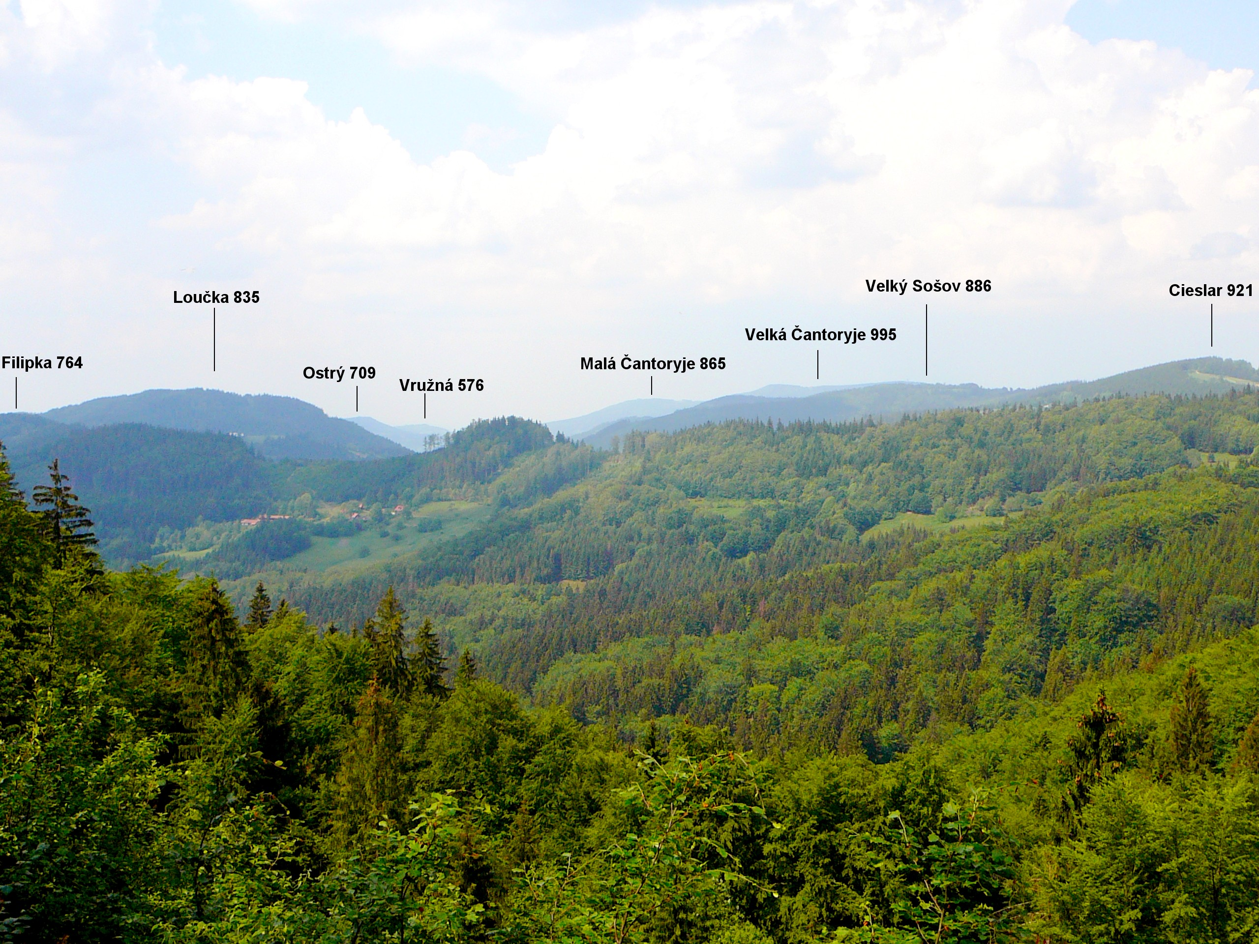 Slezské Beskydy